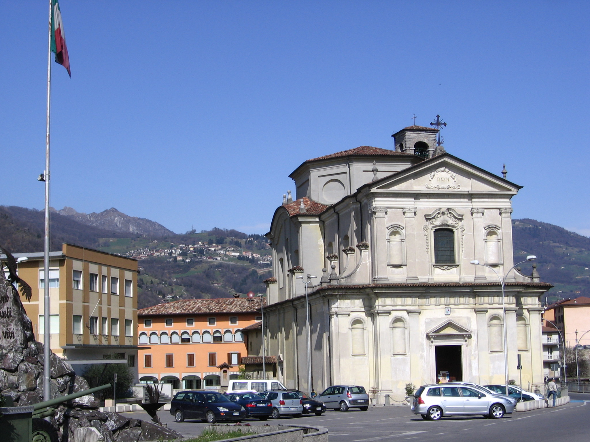 Cene, Bergamo, Italia